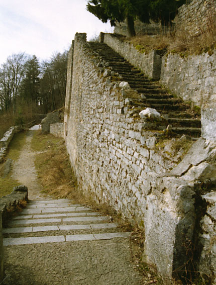 Die zwei grossen Treppen der Farnsbiurg aus dem 'Blauen Turm'